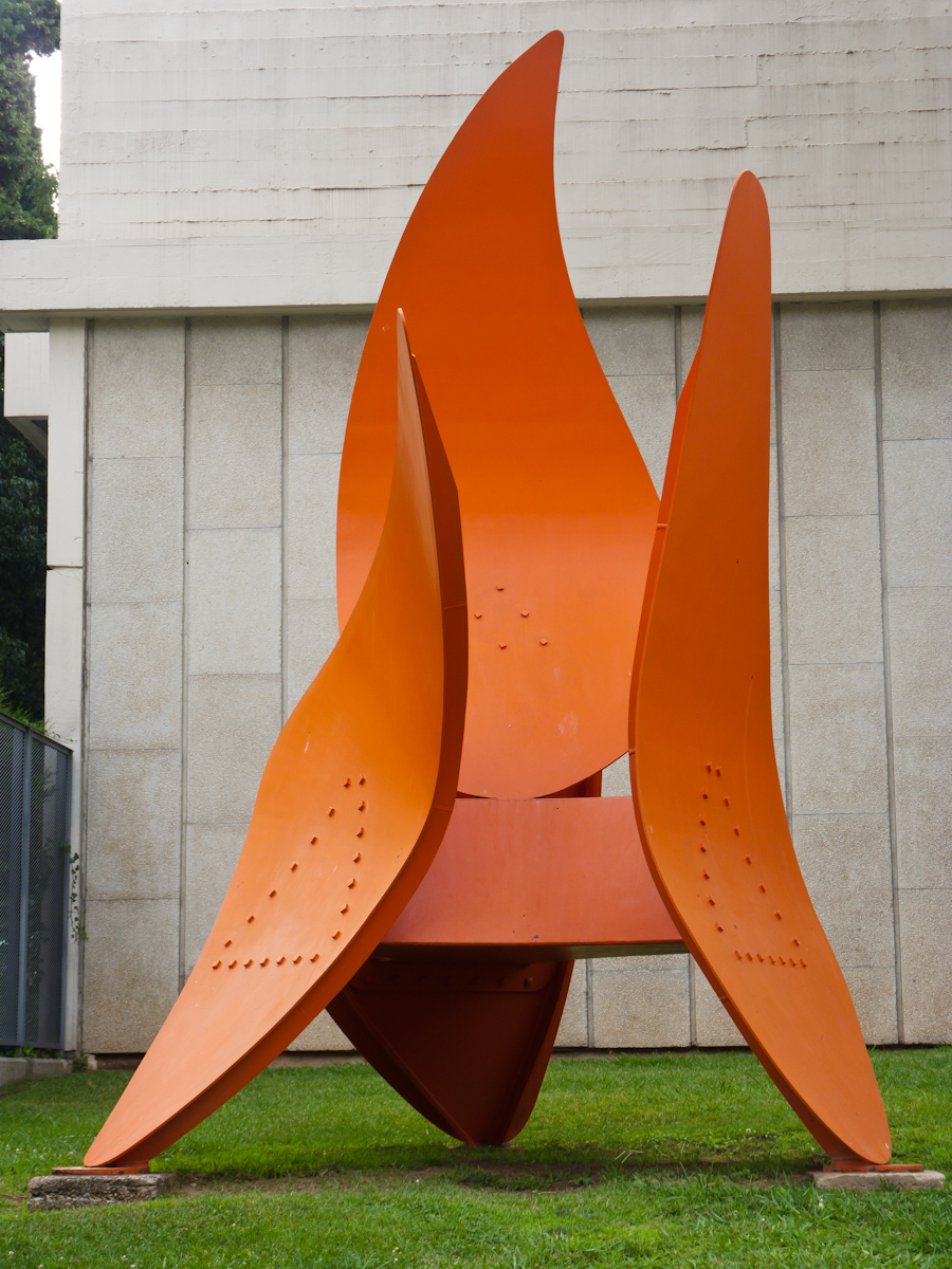 Barcelona Montjuic 1344 06 de julio de 2011